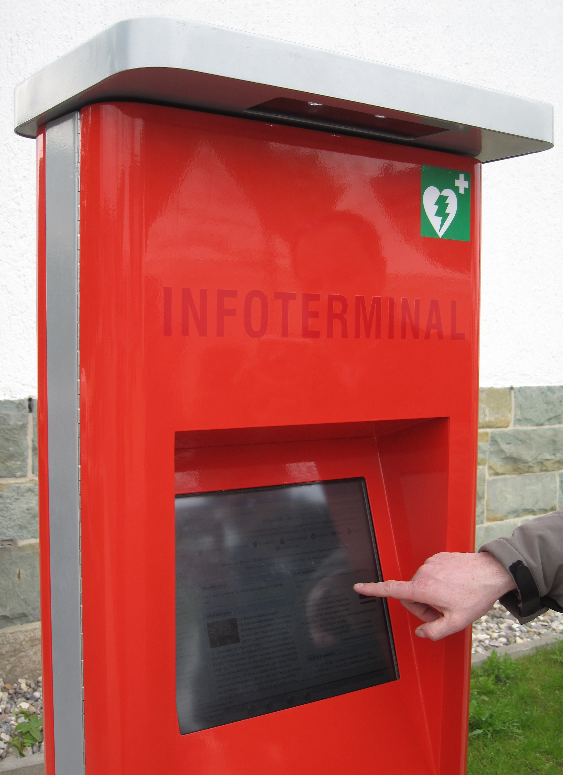 Internet-Infoterminal auf der Landesgartenschau Hemer 2010 in Hemer.